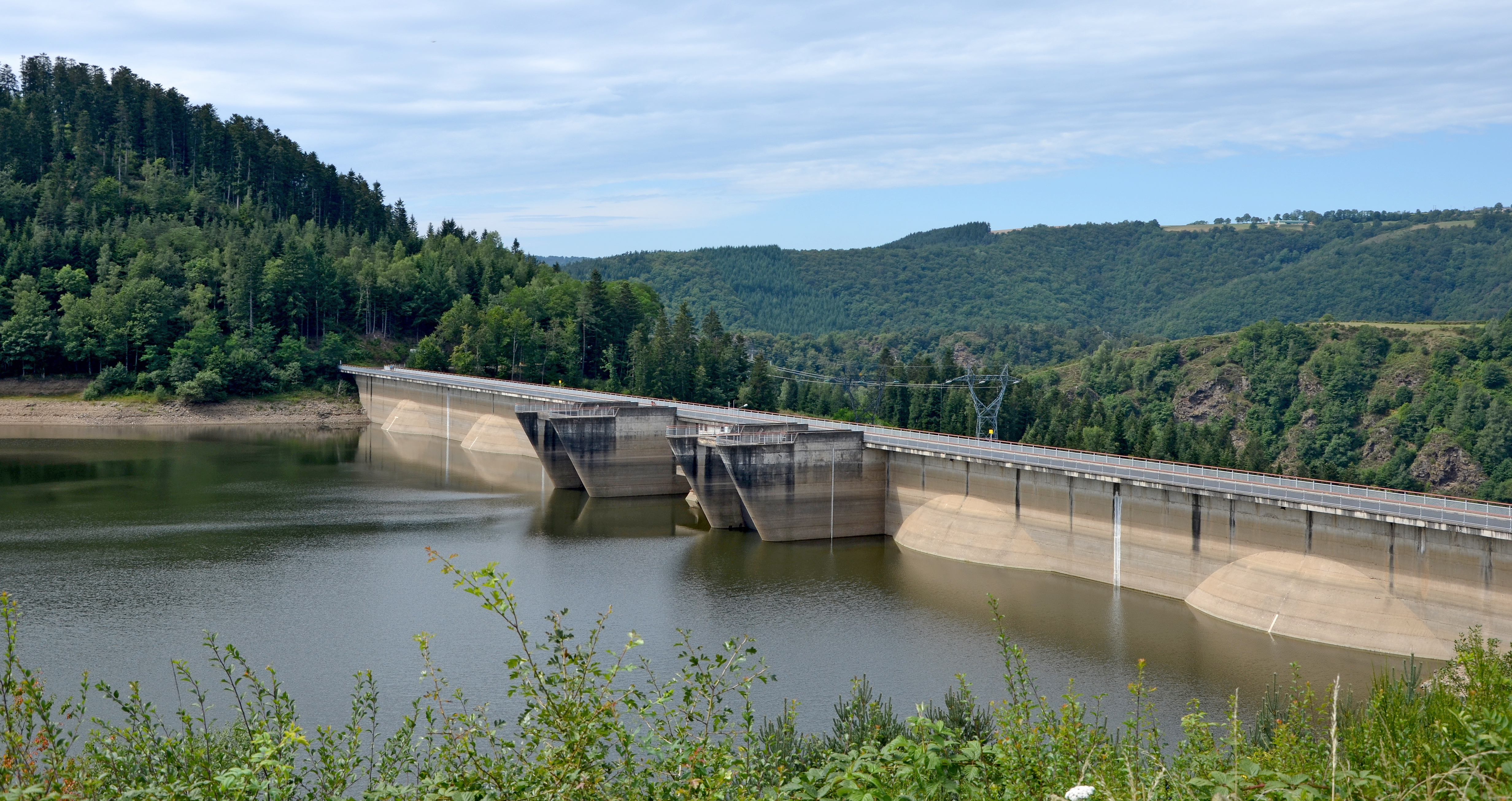 Barrage de Grandval sur la Truyère, Cantal, France